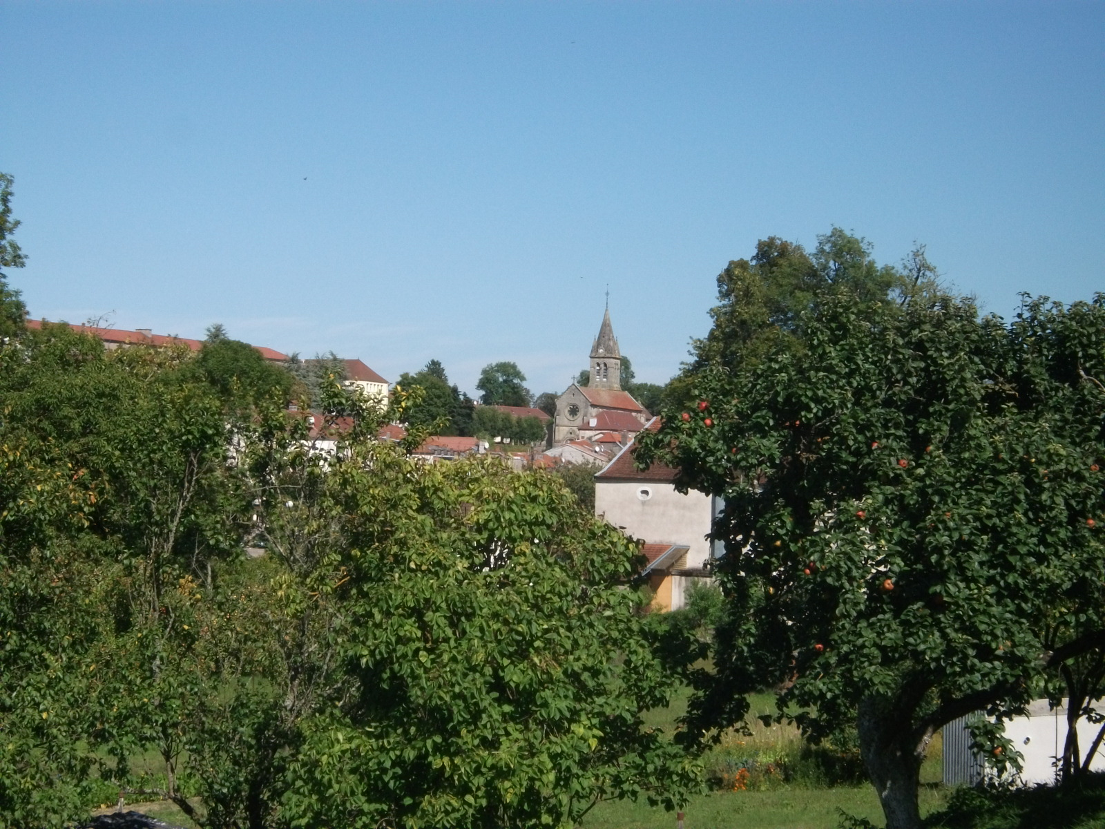 Eglise de Bourbonne-les-Bains vue de loin.